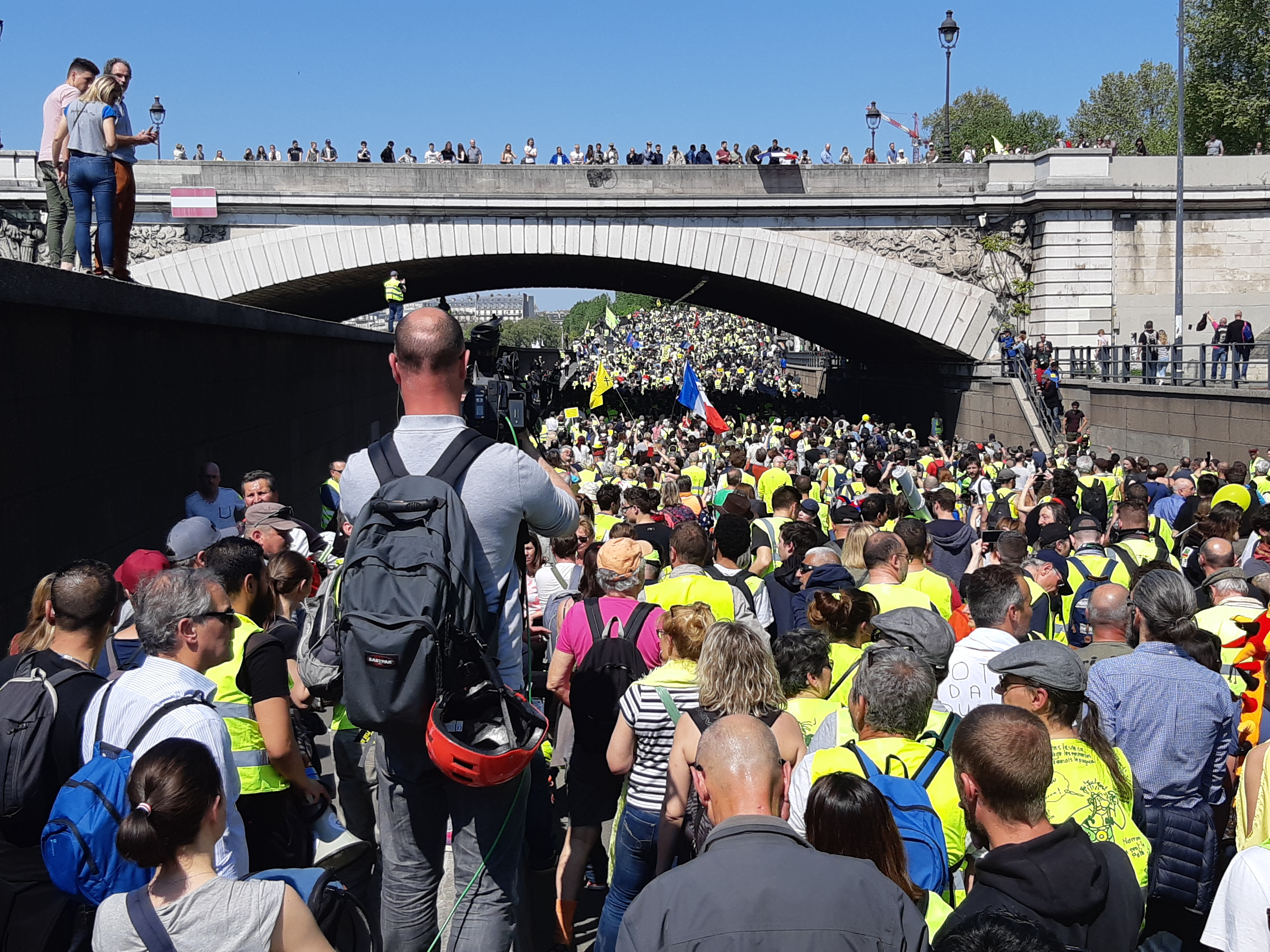 Cortège des Gilets jaunes partis de Bercy à Paris le 20 avril 2019 (acte XXIII).